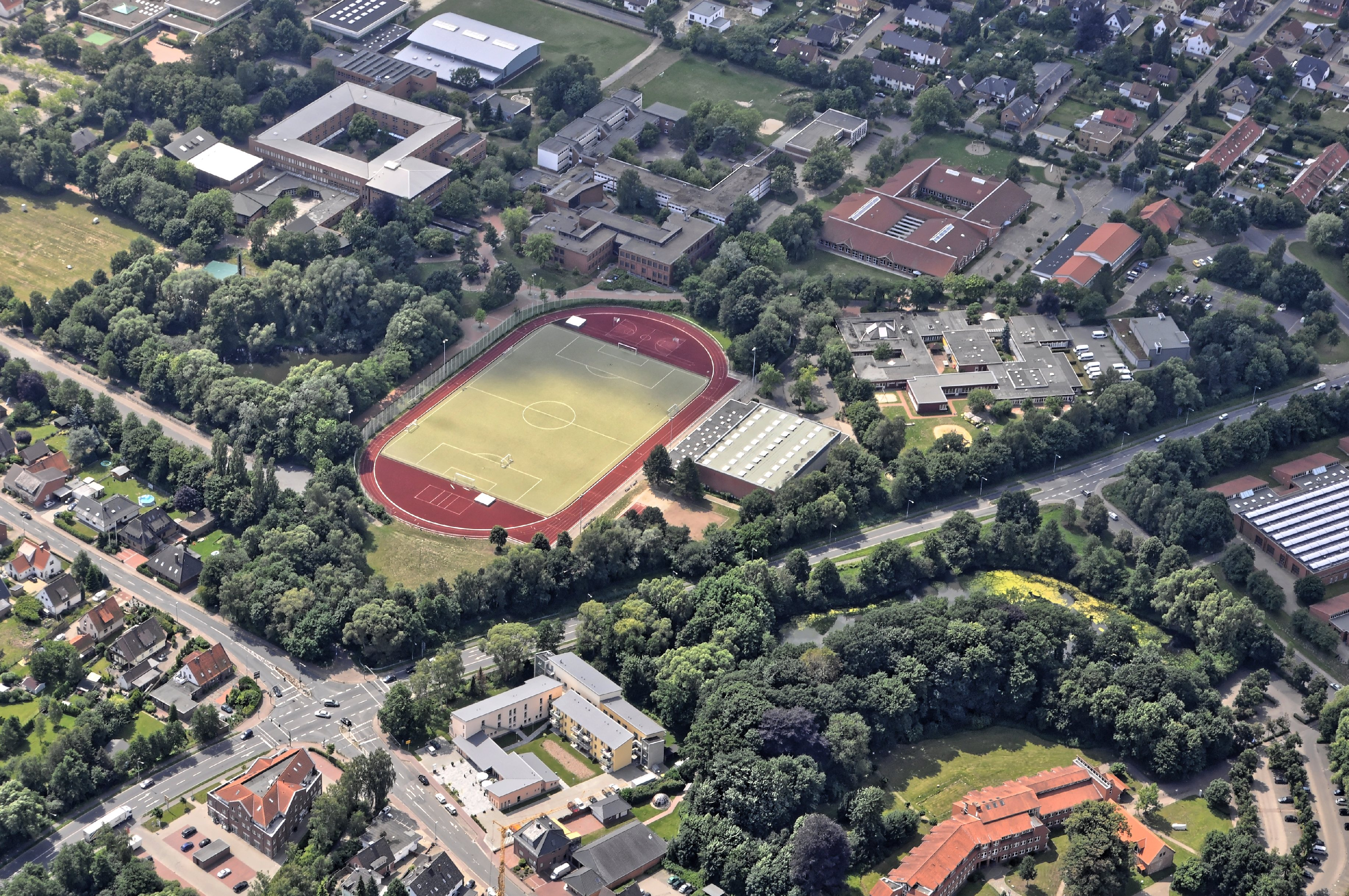 Bilder vom Flug Nordholz-Hammelburg 2015: Blick von Osten auf Syke; in der Bildmitte der Sportplatz, dahinter die Realschule, daneben links das Gymnasium; im Vordergrund rechts unten mit roten Dach der alte Amtshof.